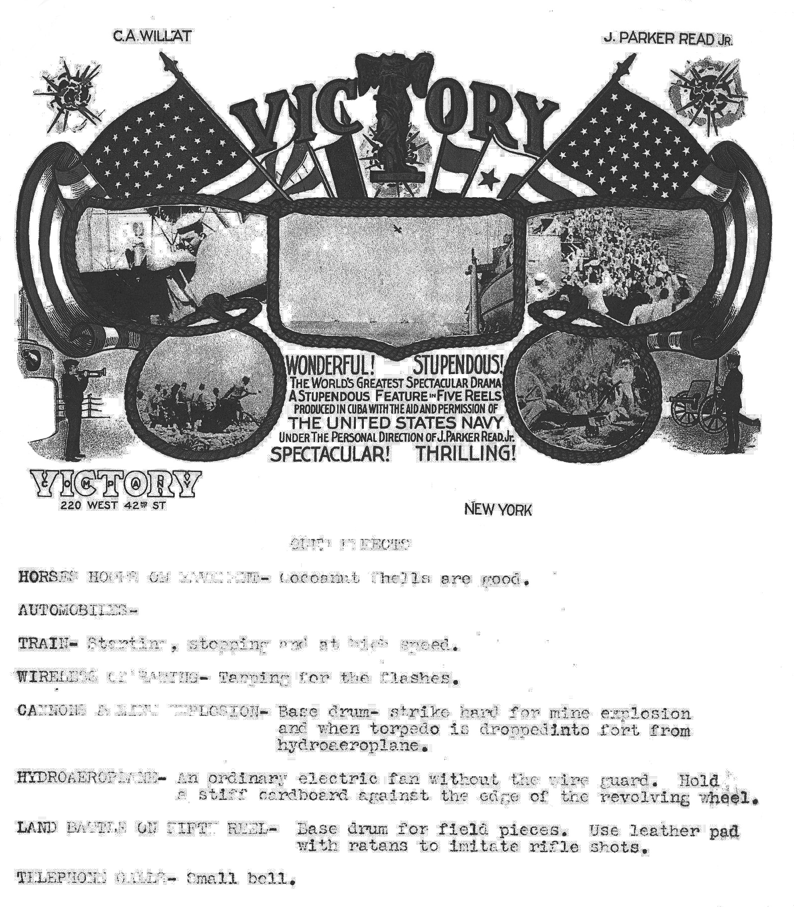 Conducteur de bruitage du film muet américain "Victory", réalisé en 1913 par J.Parker Read Jr.